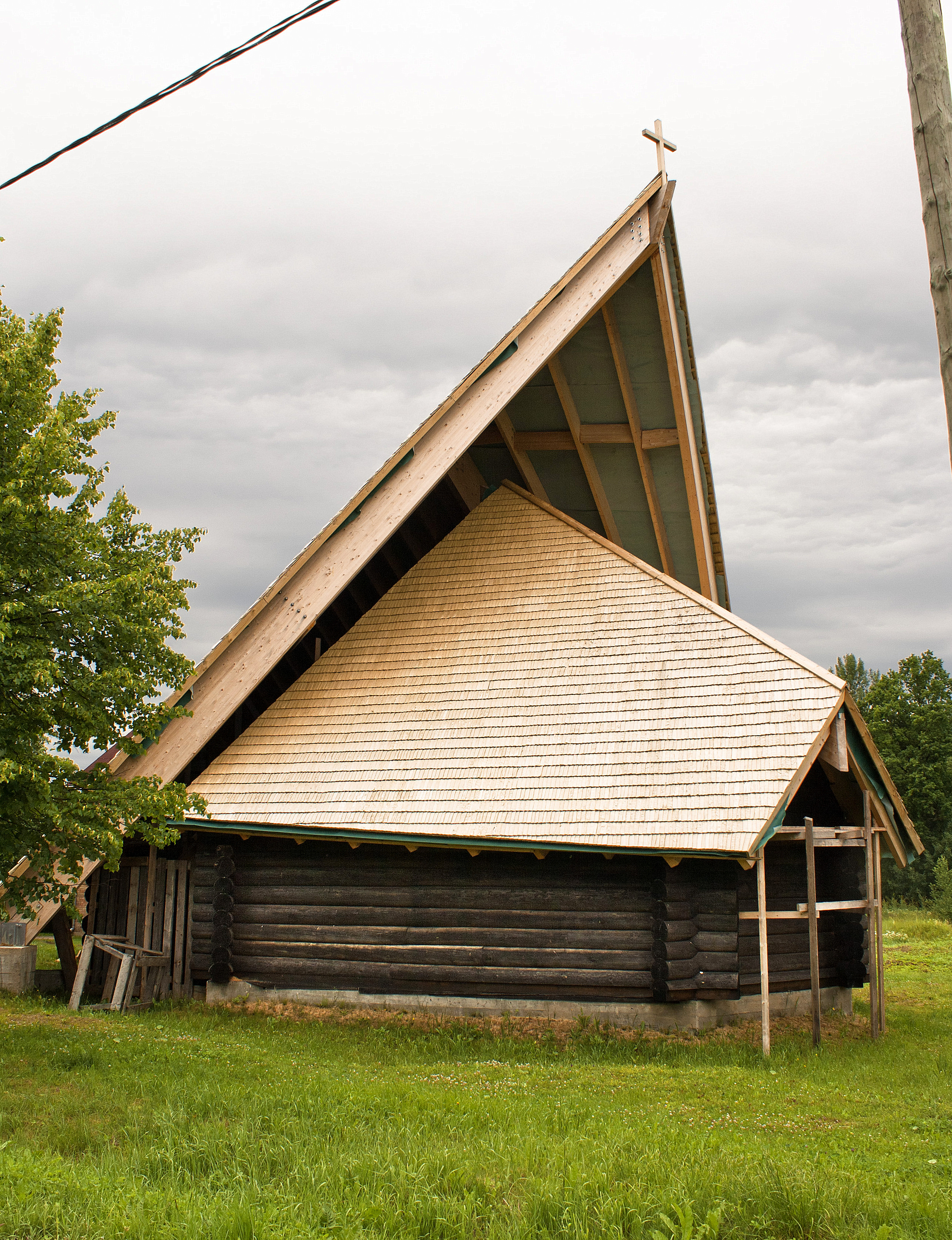 Ugāle church